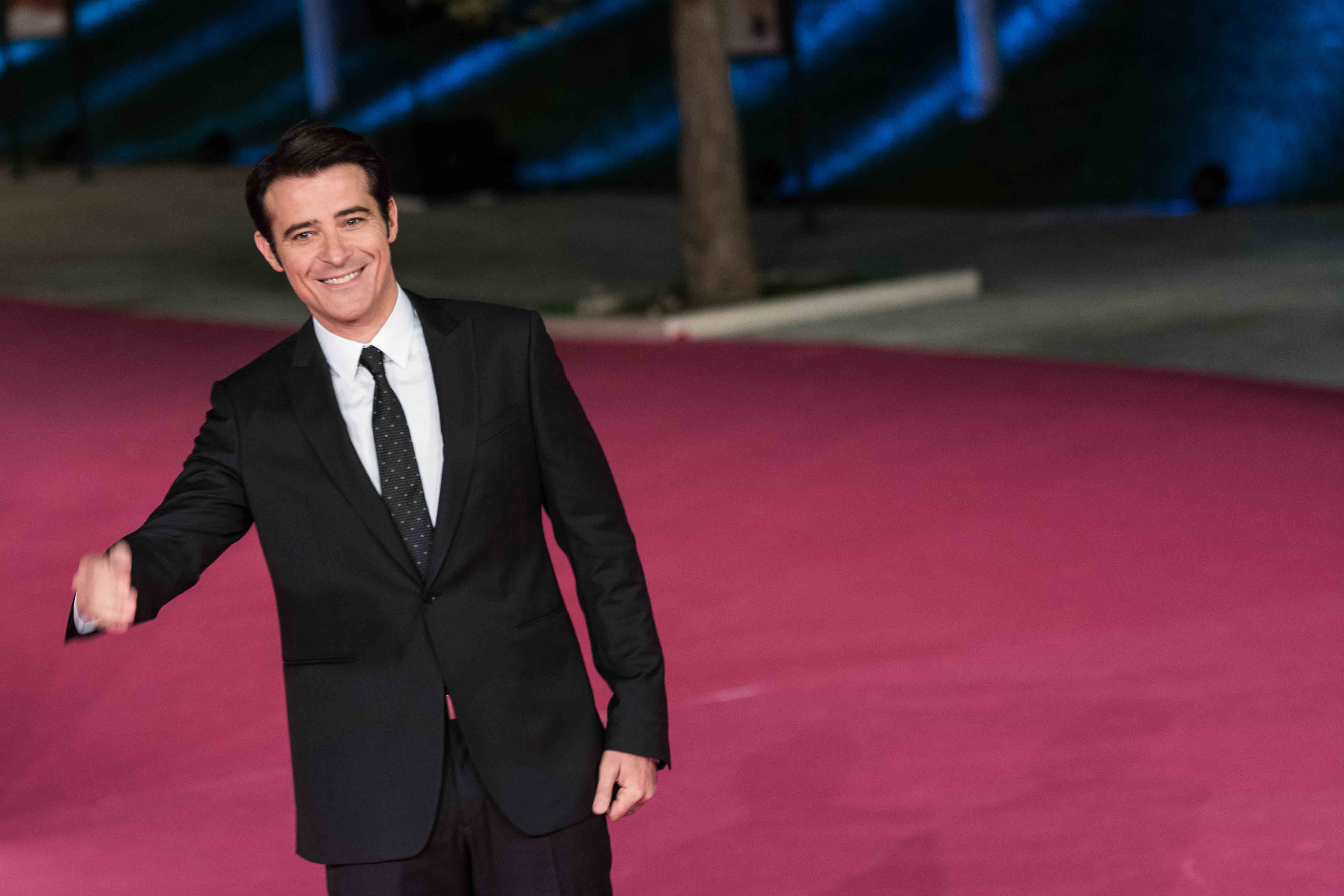 Goran Visnjic